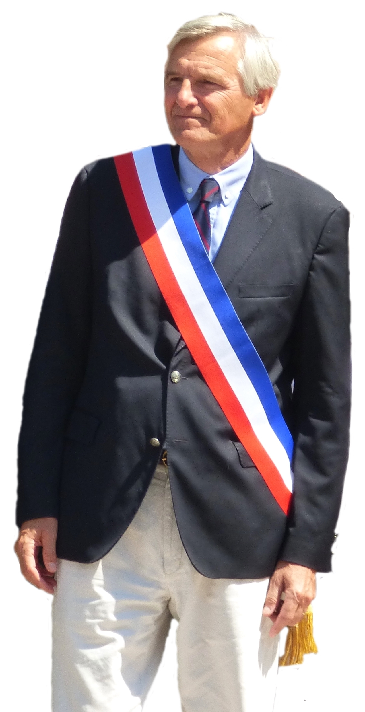 Dominique Dord, homme politique français, lors du défilé du 14 juillet 2017 à Aix-les-Bains.